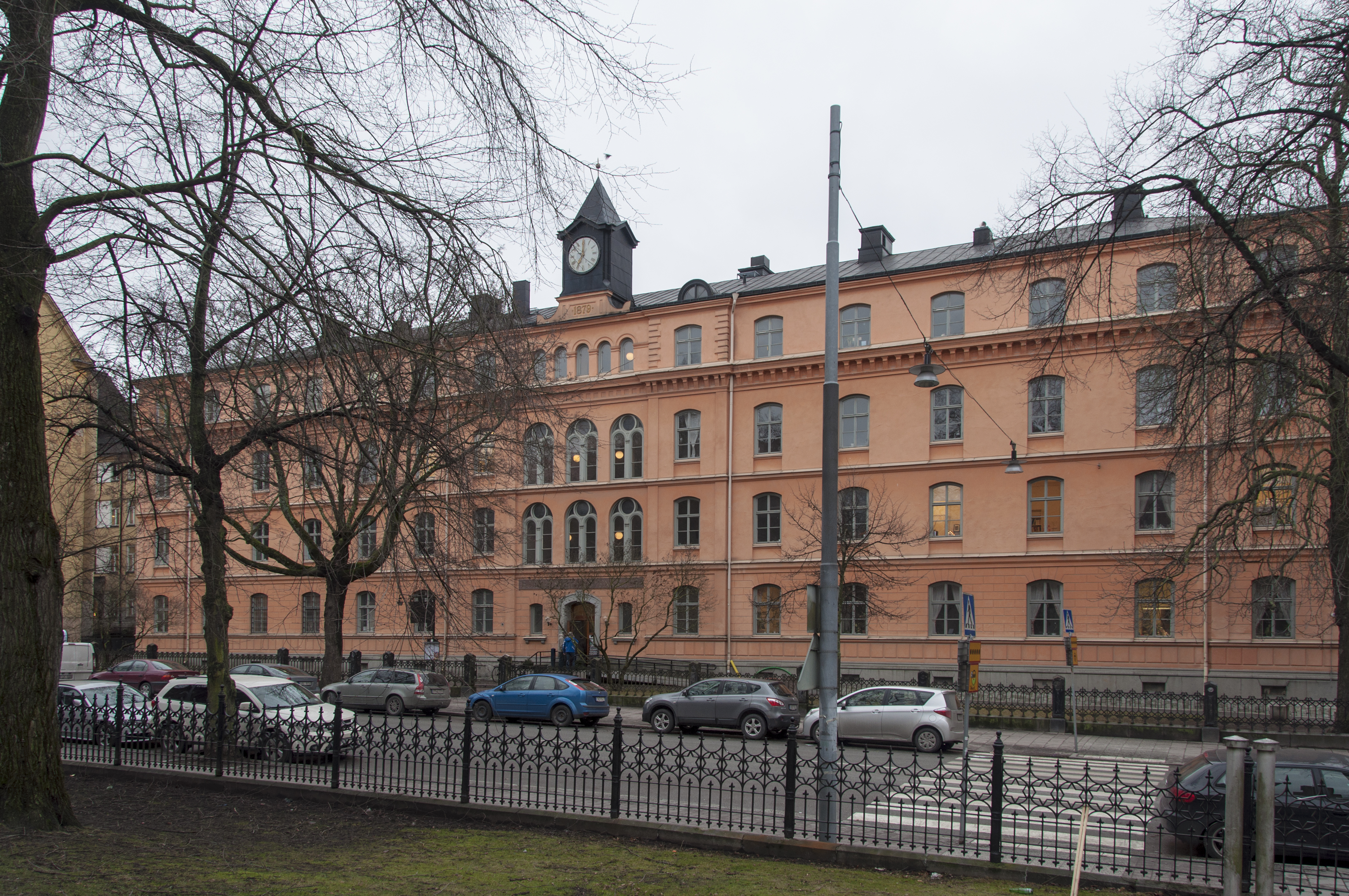 Borgerskapets änkehus, Norrtullsgatan 45, Nybyggnadsår 1877 - 1879, Axel Gotthard Jansson (Byggmästare), Direktionen för Borgerskapets Enkehus (Byggherre), Langlet Emil & Söderberg C N (Arkitekt)